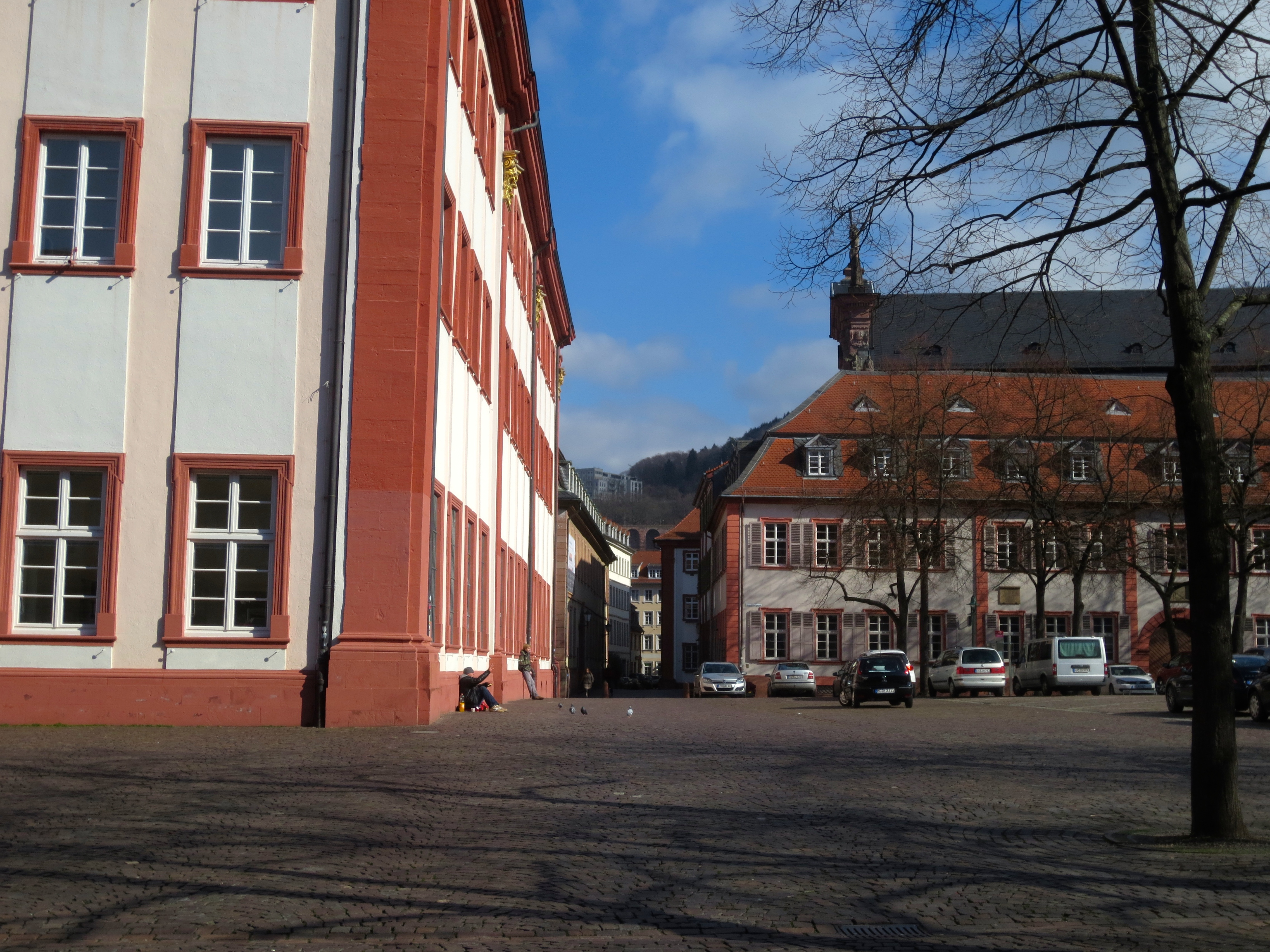 Universitätsplatz (Heidelberg) links im Bild die Alte Universität (Heidelberg) und an der östlichen Platzwand, Augustinergasse 7, das Musikwissenschaftliche Seminar, versehen mit einer Gedenktafel für Karl Gottfried Nadler und Karl Bernhard Stark